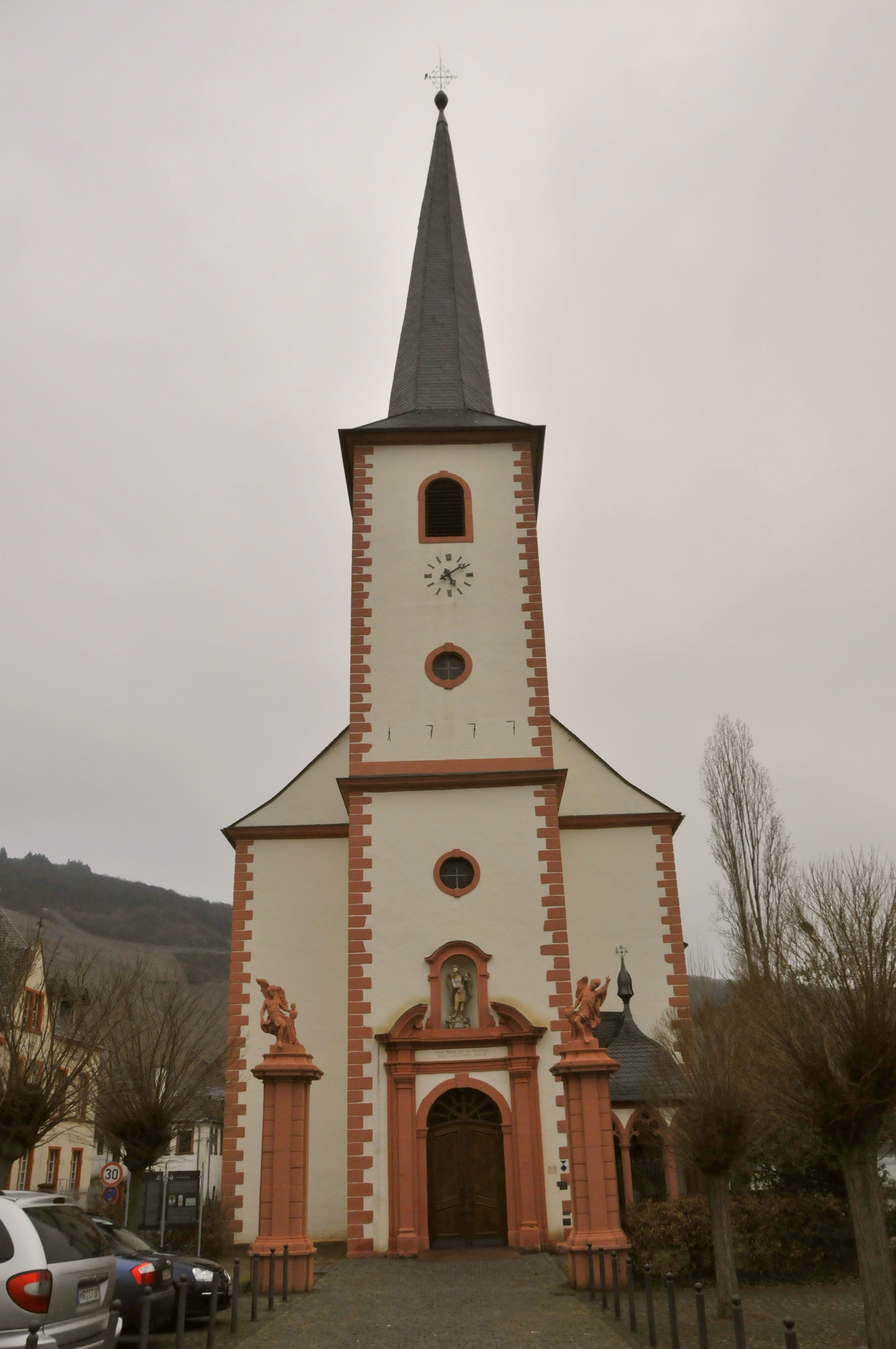 Piesport, Michaelskirche